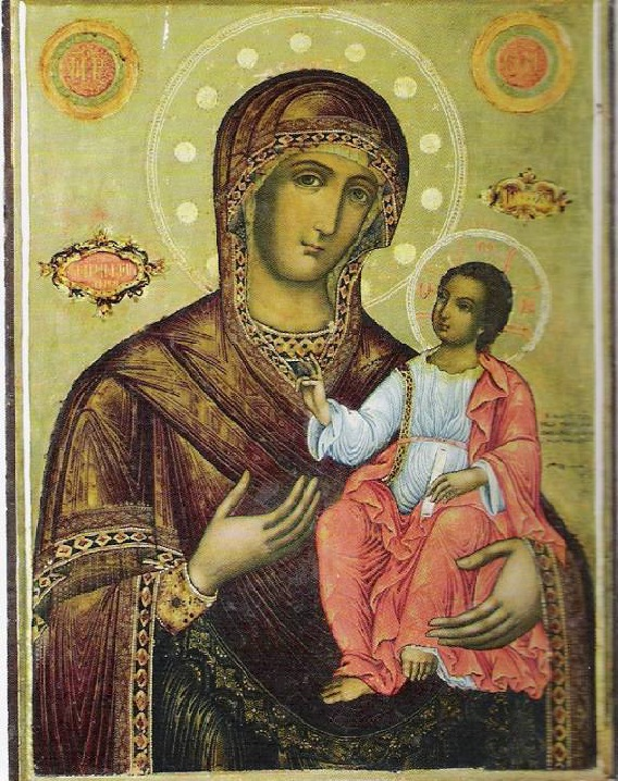 Икона в метох „Пчелина" с църквата „Успение Богородично“ в Рилския манастир от Макарий Галатищки.